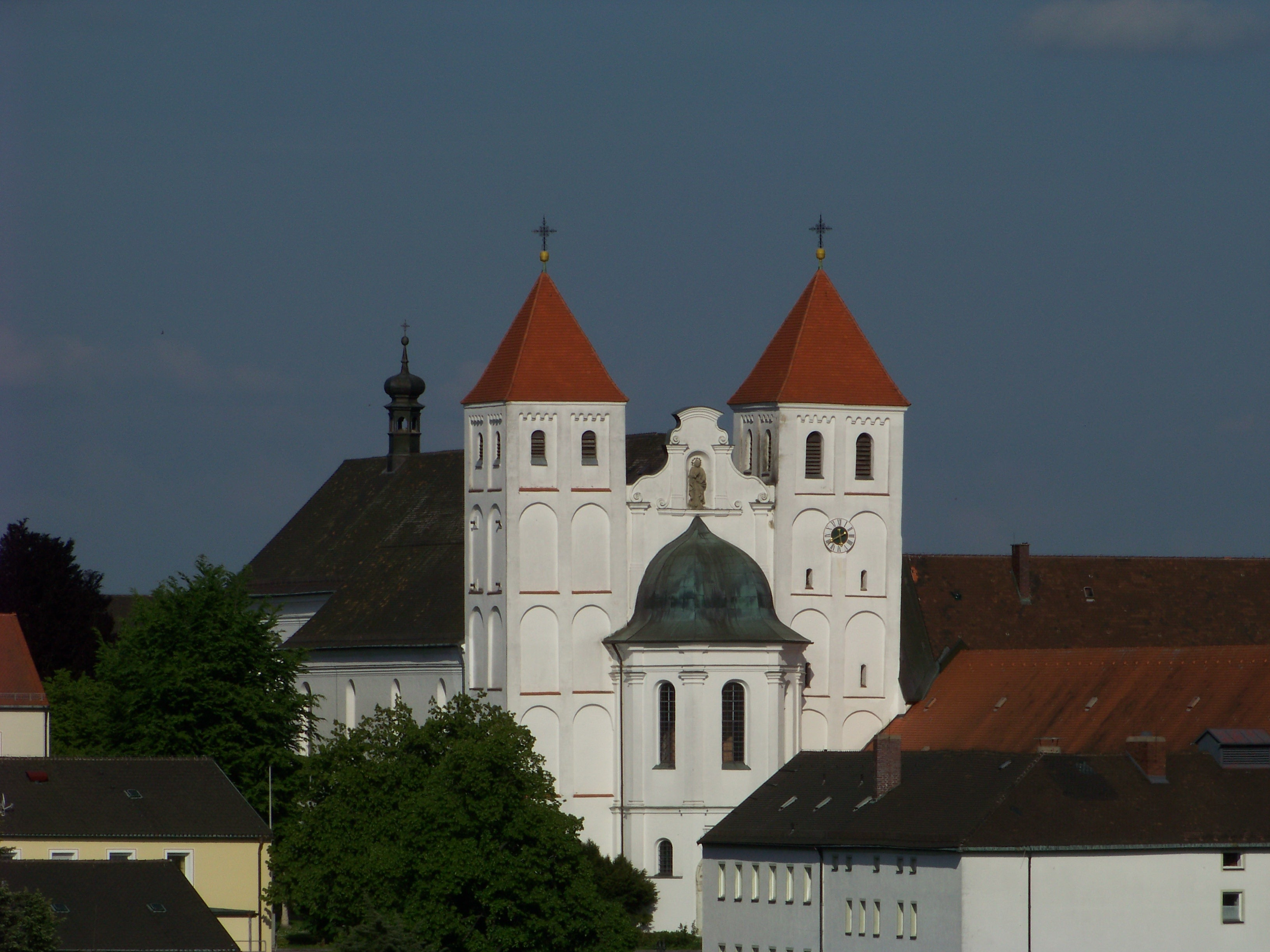 Mallersdorf, Pfarrkirche St. Johannes, ehemalige Benediktiner Klosterkirche